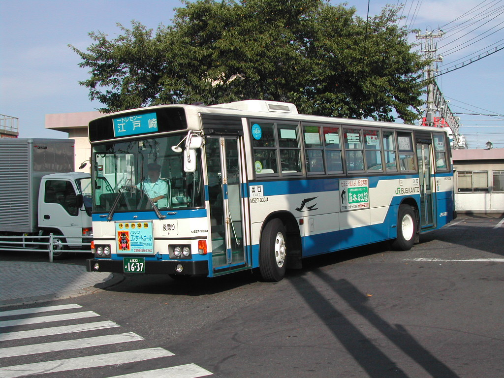 土浦駅前にて、2002-8-14 撮影